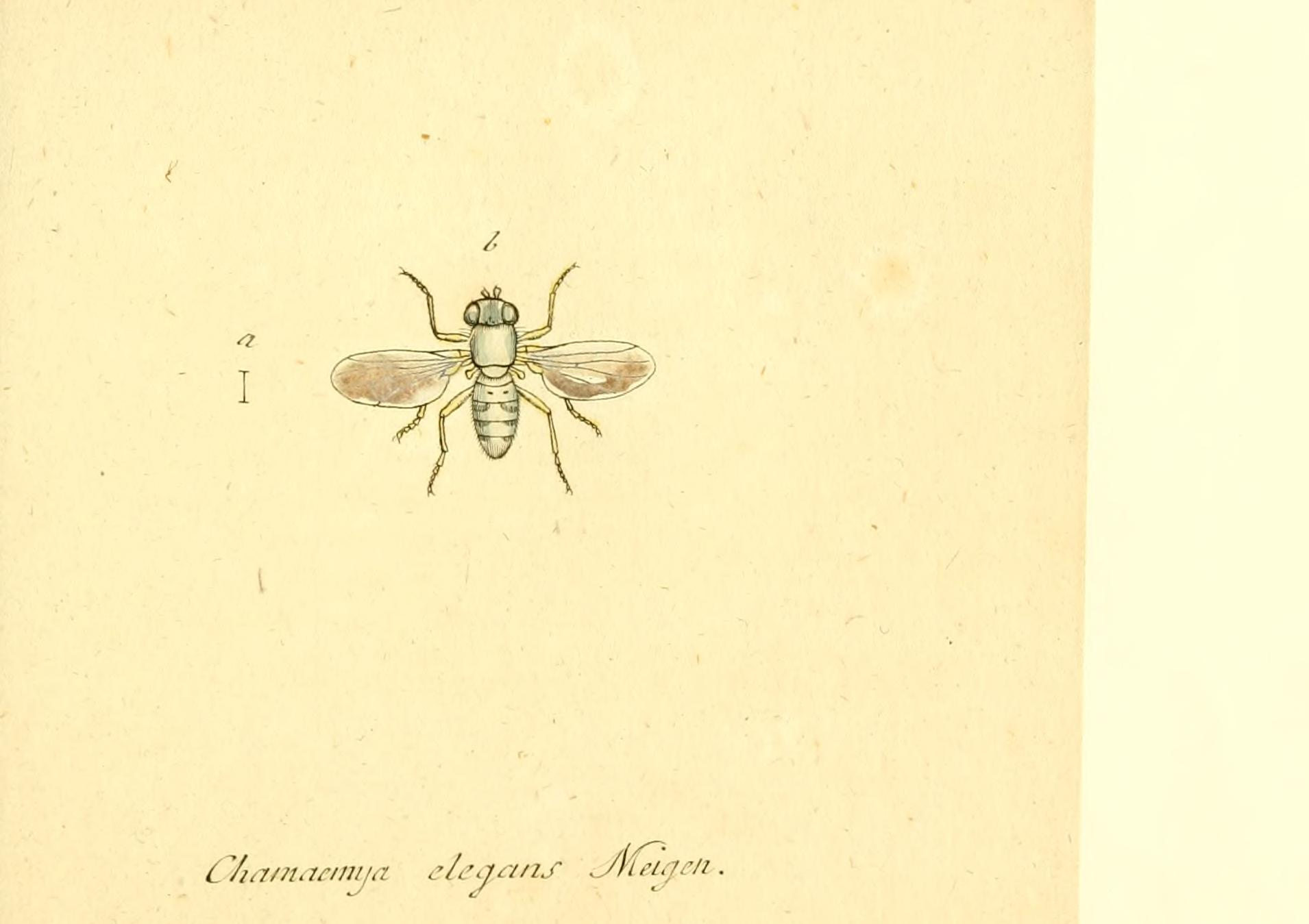 Chamaemya elegans Meigen in: Fauna Germanica, Diptera : 242 col. Tafl. mit Text / vollständige Sammlung der in den ersten von Panzer selbst herausgegeb. 109 Heften.